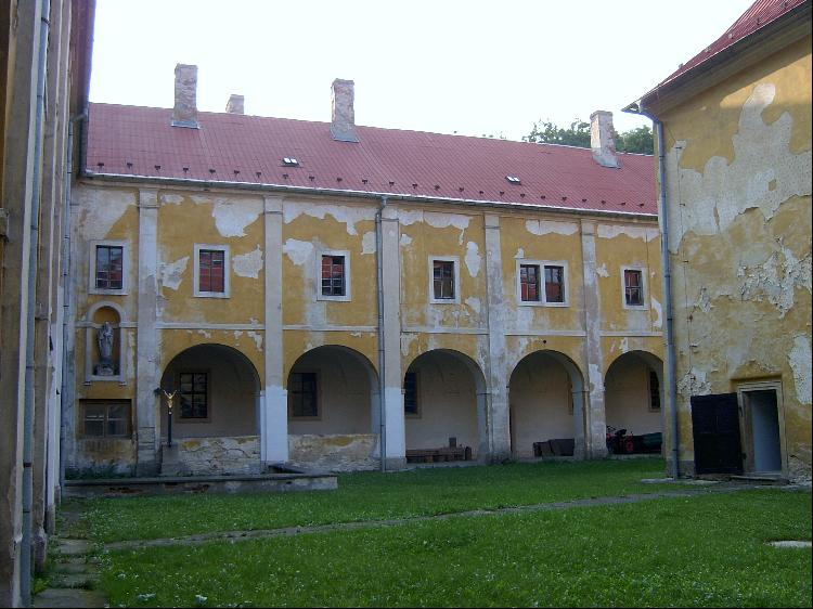 Klášter Hájek, okres Praha-západ.